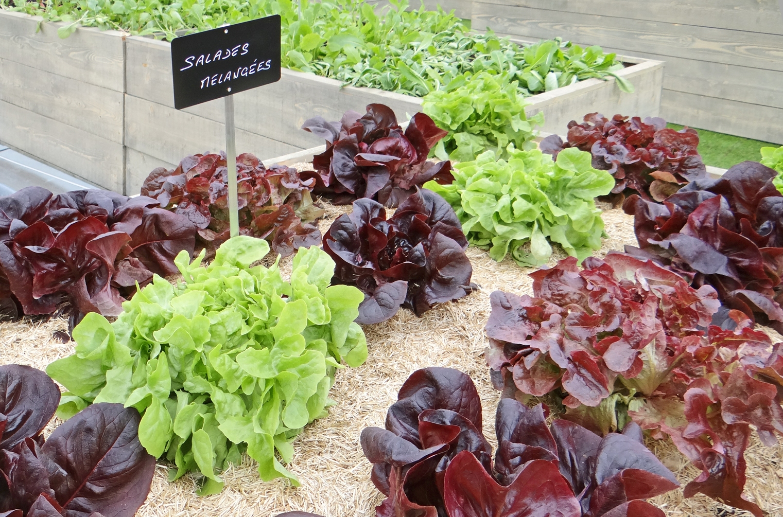 Du 4 au 7 avril, le "BMW i Born Electric Tour" loue les locaux du Palais de Tokyo pour montrer en avant-première à Paris ses véhicules électriques qui seront mis sur le marché en septembre 2013. Le site du tour BMW-i A cette occasion, le chef étoilé Alain Passard, associé à cette opération promotionnelle axée sur le développement durable et les énergies renouvelables, présente un très beau jardin potager sur le toit du palais de Tokyo. C'est une opportunité pour monter sur les toits qui sont habituellement inaccessibles au public et bénéficier en plus d'un petit exposé de jeunes jardiniers très compétents ; l'intérêt pour l'art contemporain n'est pas incompatible avec le jardinage ! Signe d'un temps de crise, les visiteurs de ce week-end d'avril auront compris que le Palais de Tokyo a besoin de crédits, comme le musée Rodin (qui loue son jardin à de grandes marques mais pas pour y planter des légumes) ou d'autres grands musées parisiens, il doit absolument compléter ses recettes courantes par des locations d'espaces et du mécénat. Le site du palais de Tokyo (ouvert jusqu'à minuit)